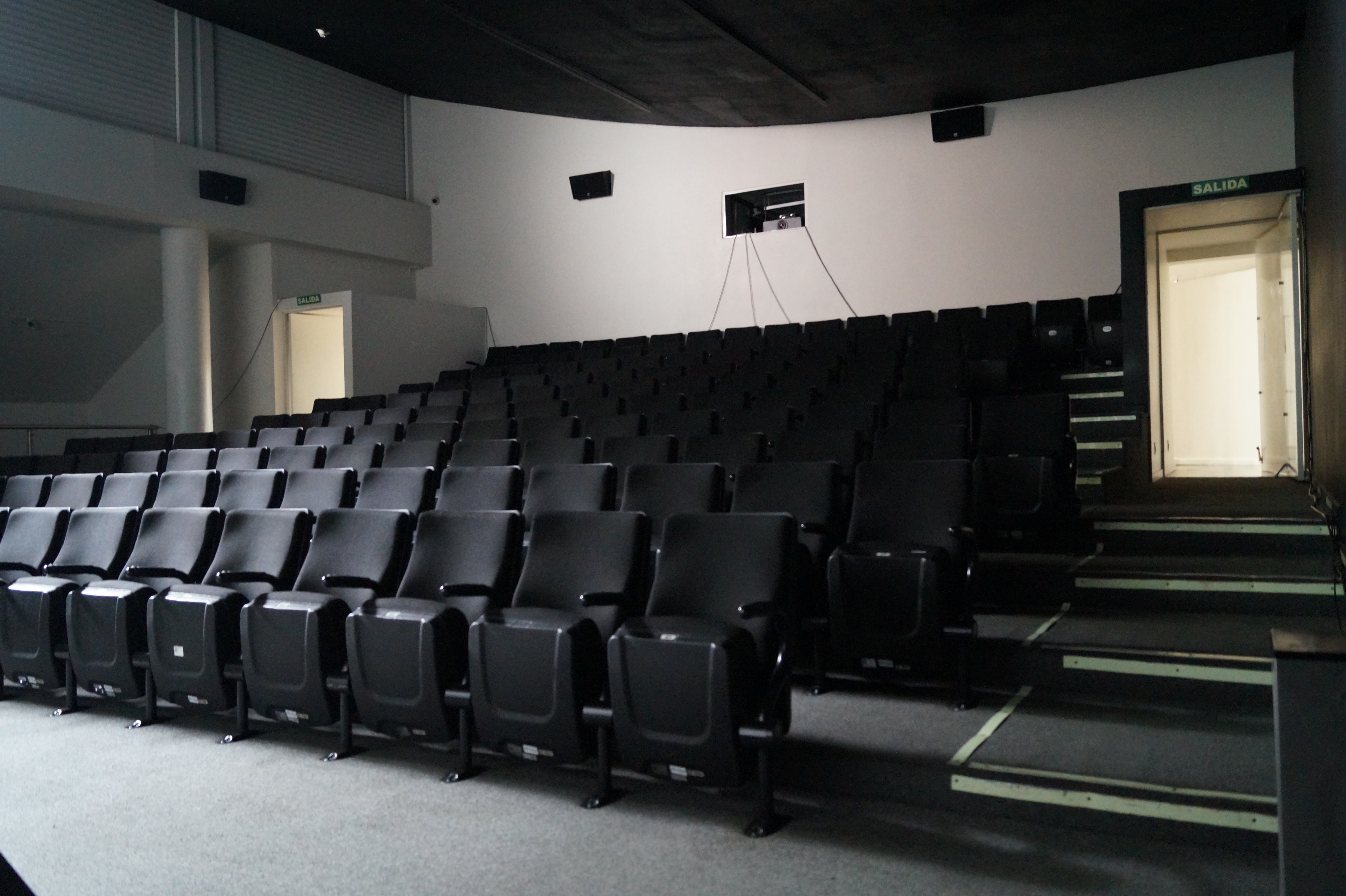 Sala de cine bien iluminada, con butacas negras y dos entradas de acceso en el cine Lido en Centro Cultural Bella Epoca, Colonia Condesa, Mexico.